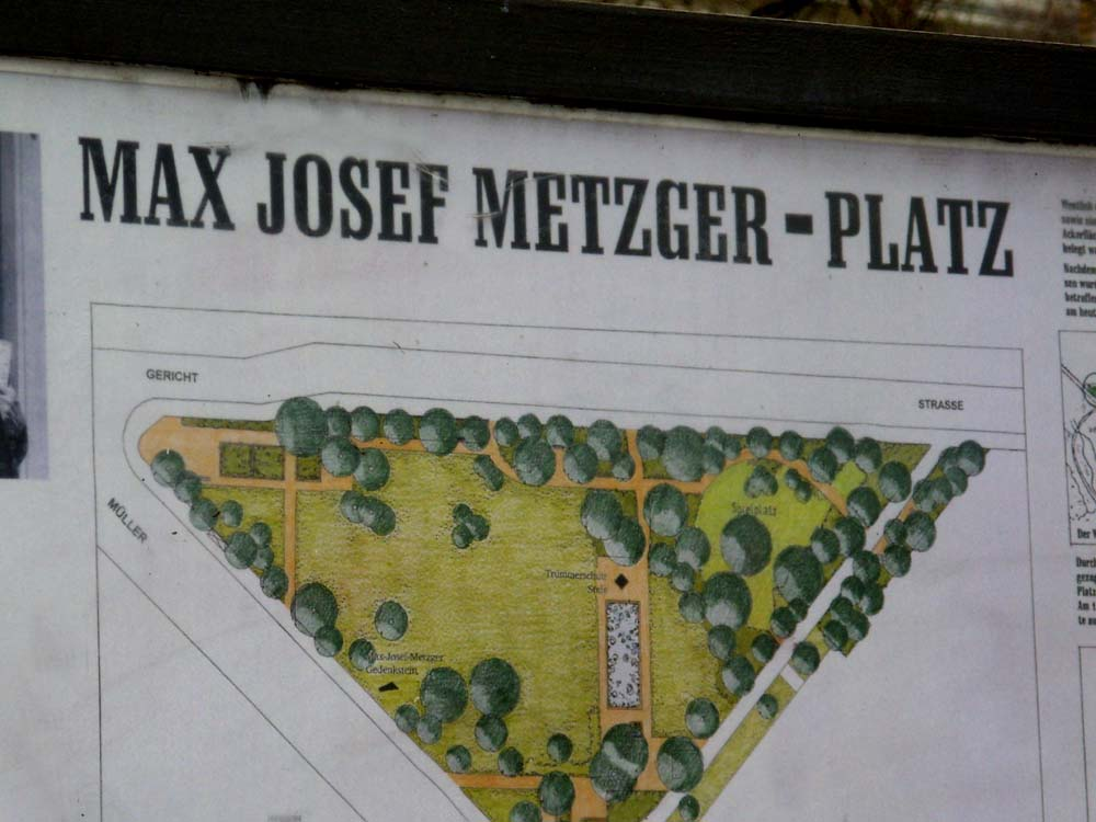 Max-Josef-Metzger-Platz Berlin-Wedding (Germany)